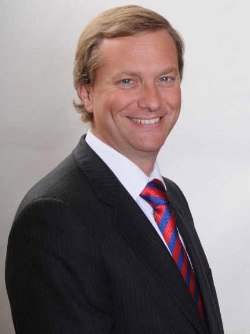 José Antonio Kast Rist